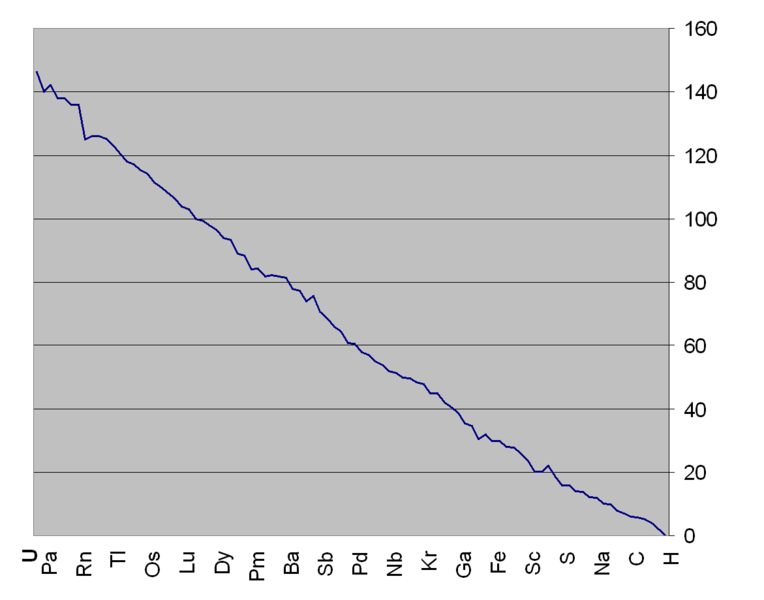 גרף המתאר את ההפרש בין המשקל האטומי (בדלטון) לבין המספר האטומי של היסודות מהמימן עד האורניום. מבוסס על הנתונים כאן.